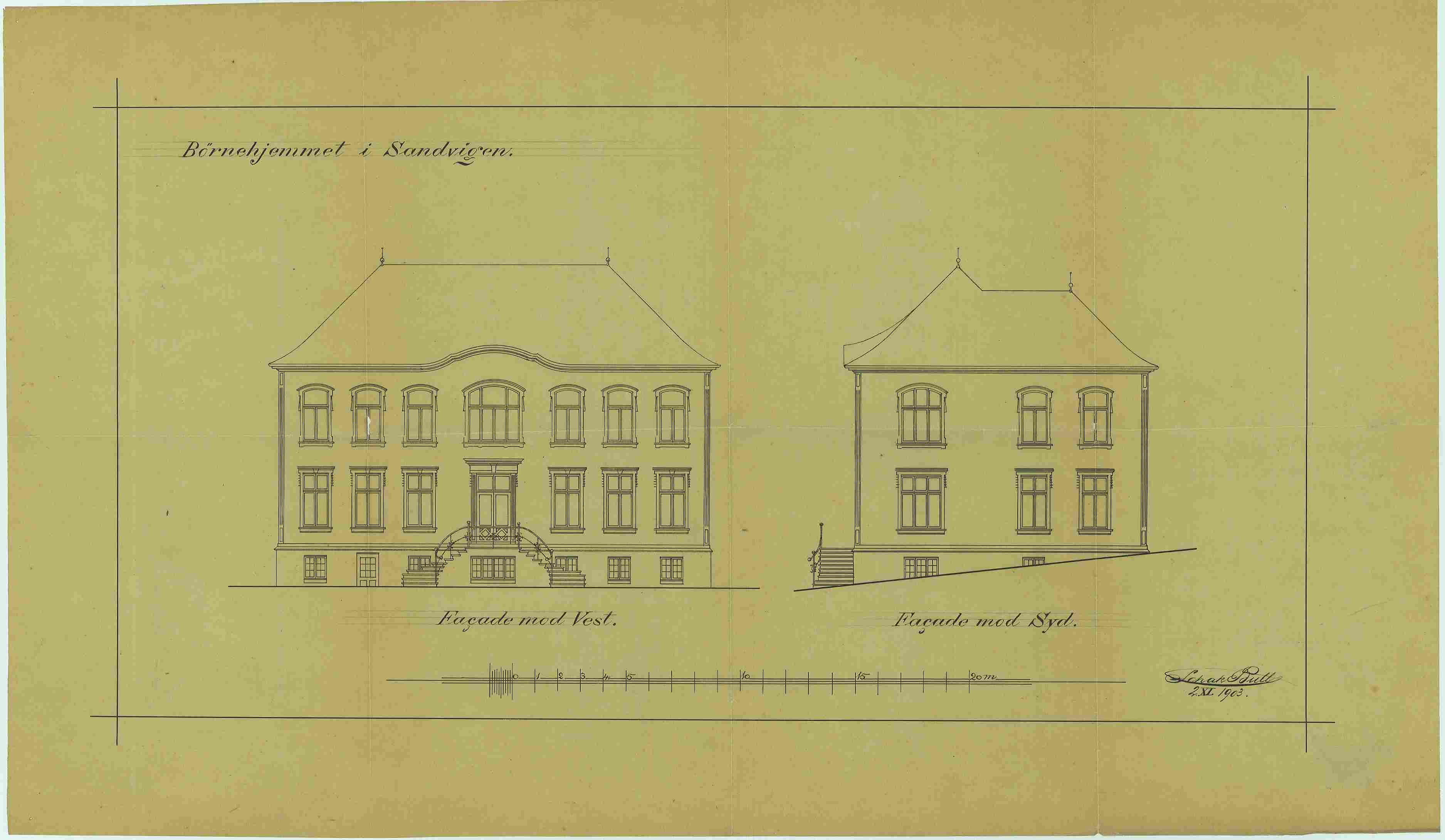 Arkitekttegninger av hus nummer 2, Sandviken Barnehjem.